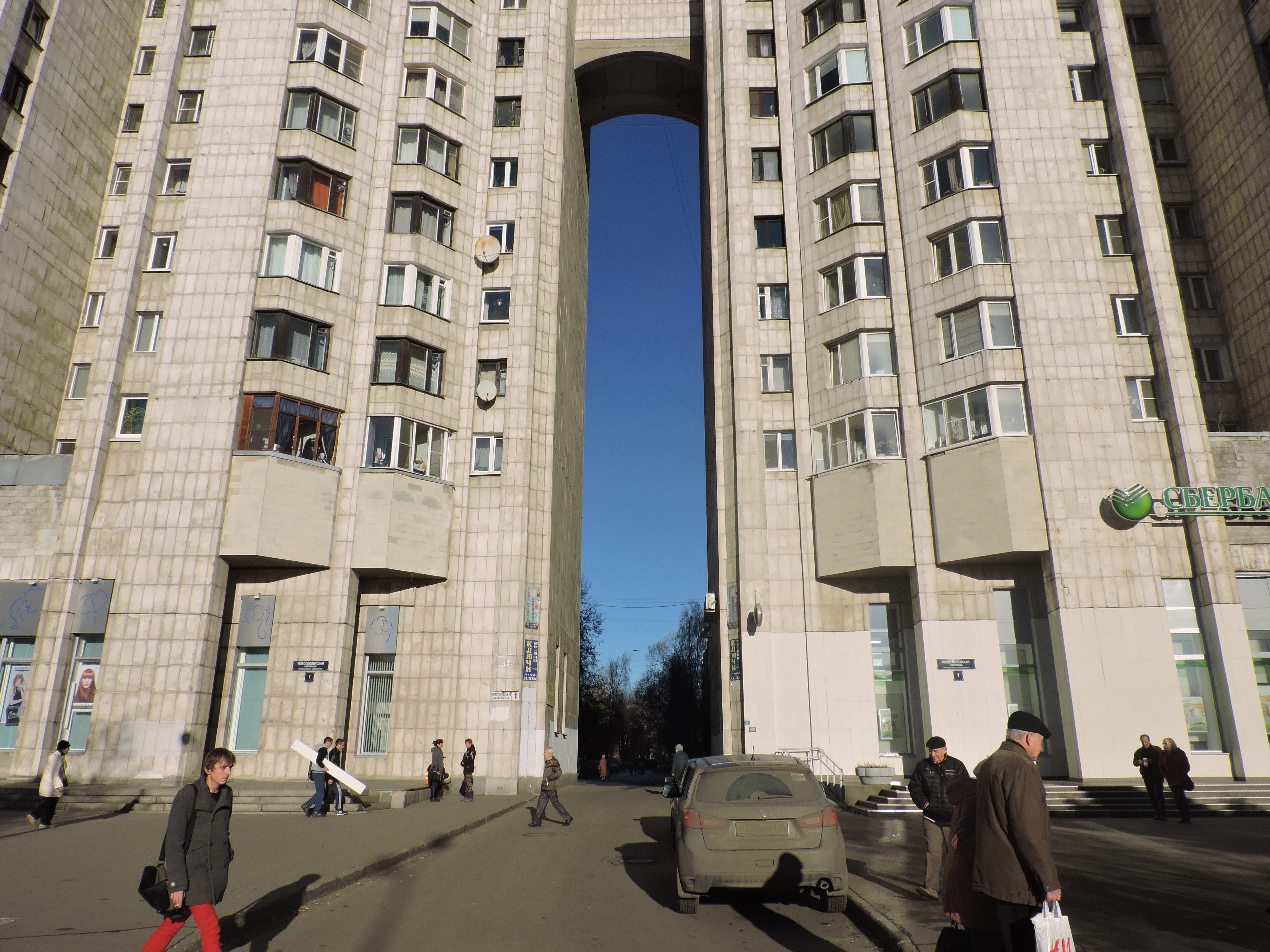 Высоченная арка (Новосмоленская наб., 1)